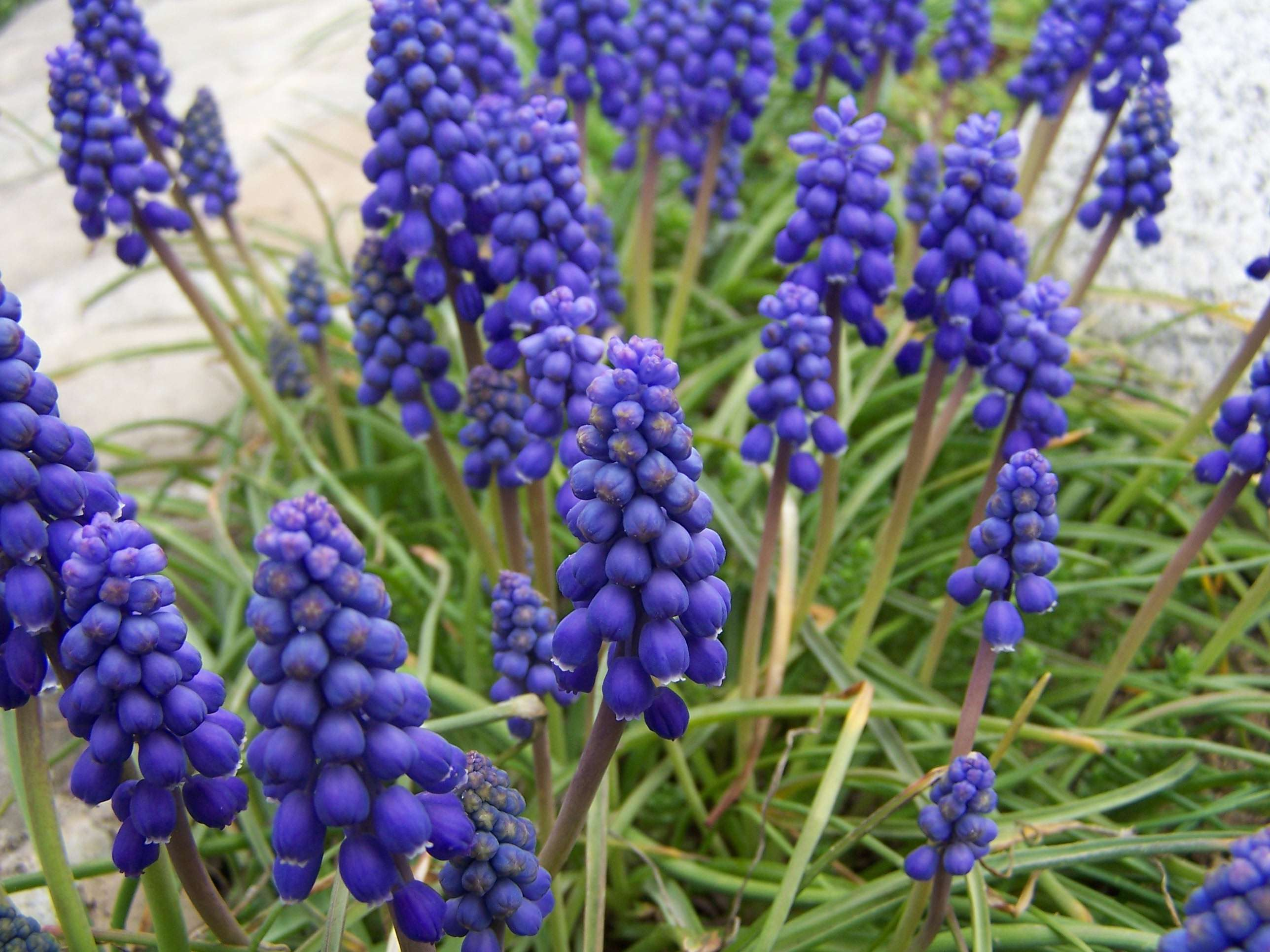 Muscari armeniacum (pl. szafirek armeński)